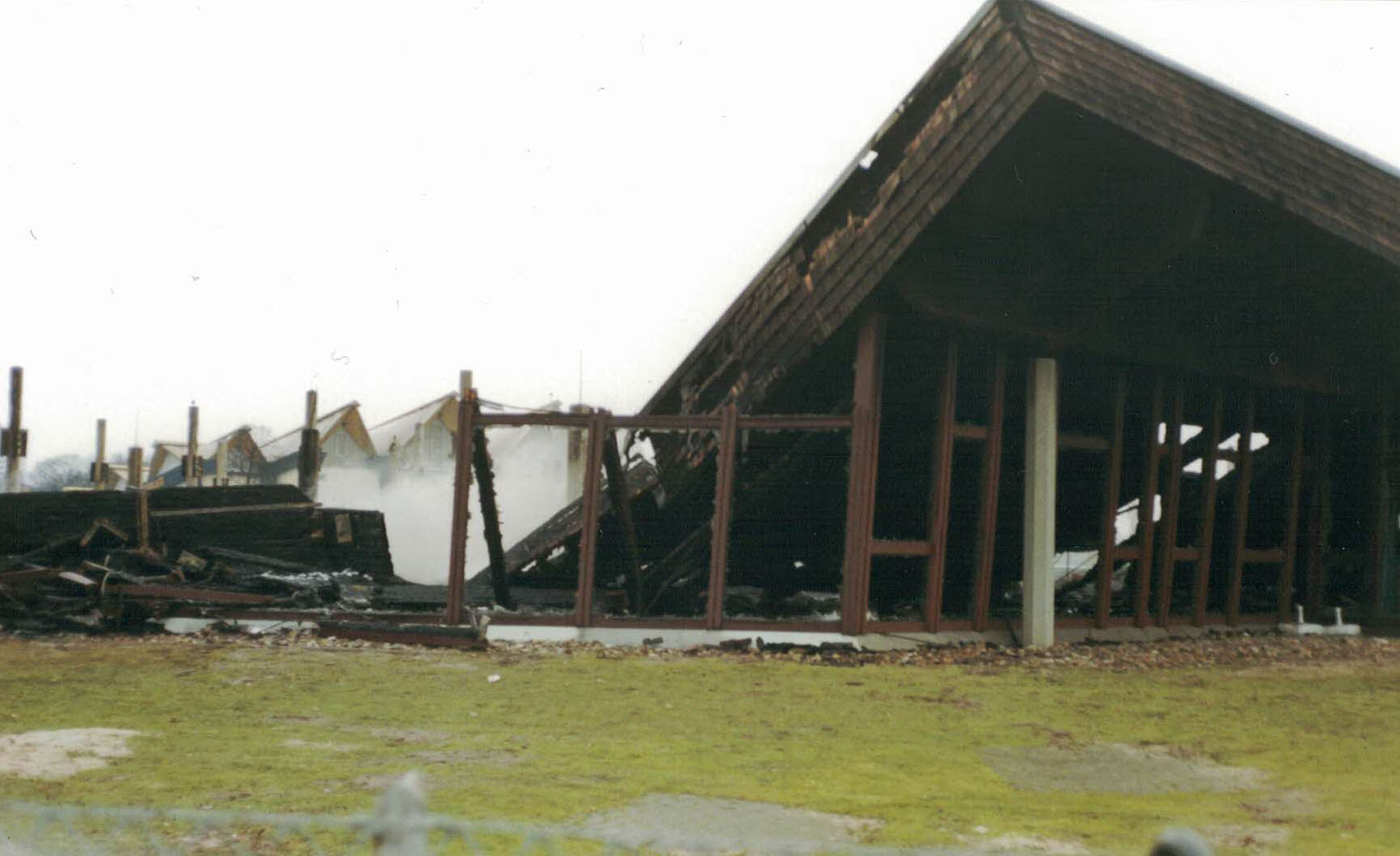 Abgebranntes Badeland in Wolfsburg.